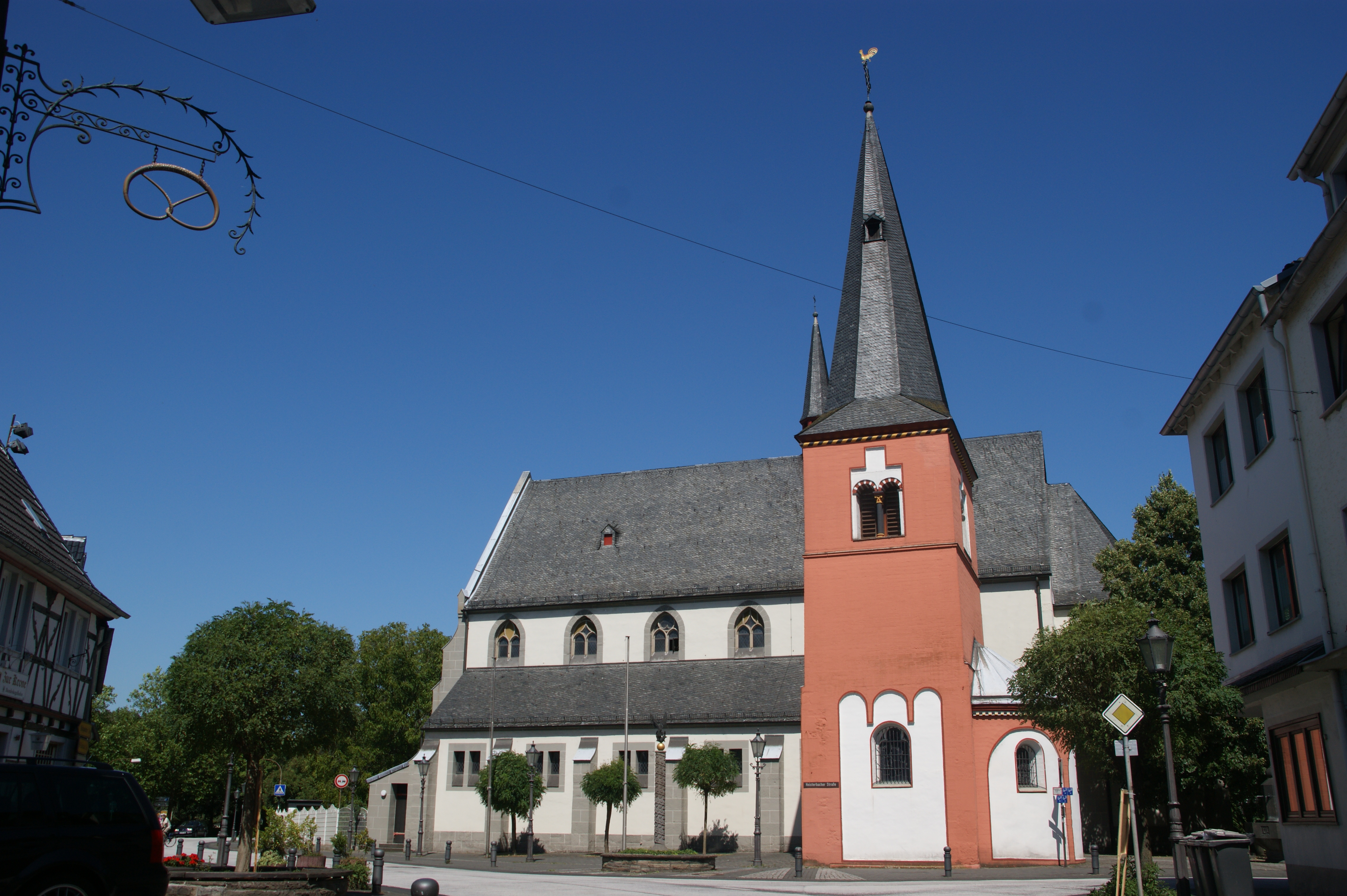 Katholische Kirche St. Michael in Königswinter-Niederdollendorf: Ansicht von der Hauptstraße